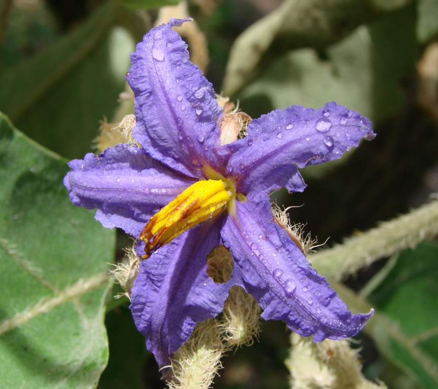 Solanum lycocarpum - SOLANACEAE Parque Olhos D' Água - Brasília - Distrito Federal - Brasil.